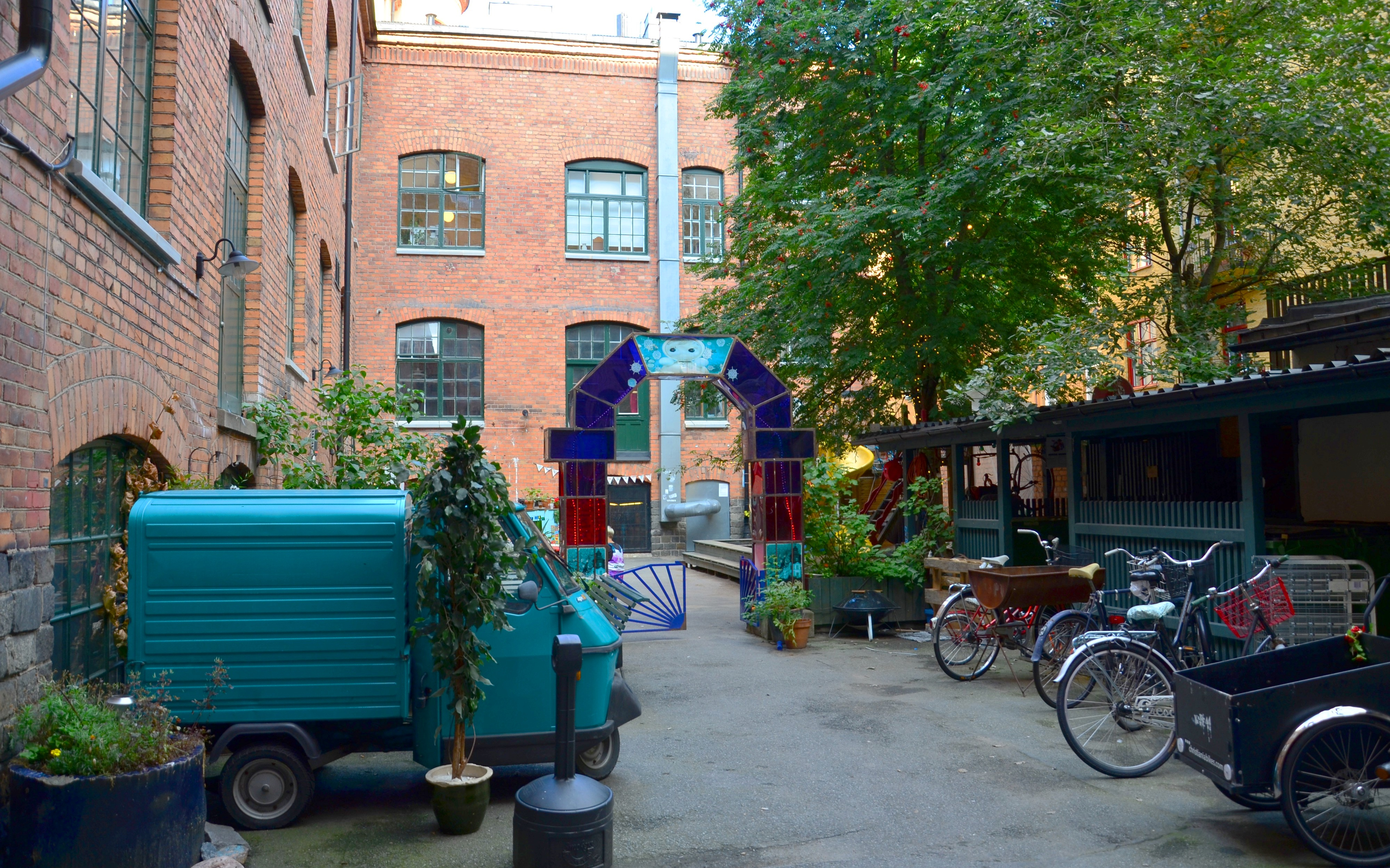 Arbetskollektivet Kapsylen på Södermalm, Stockholm.